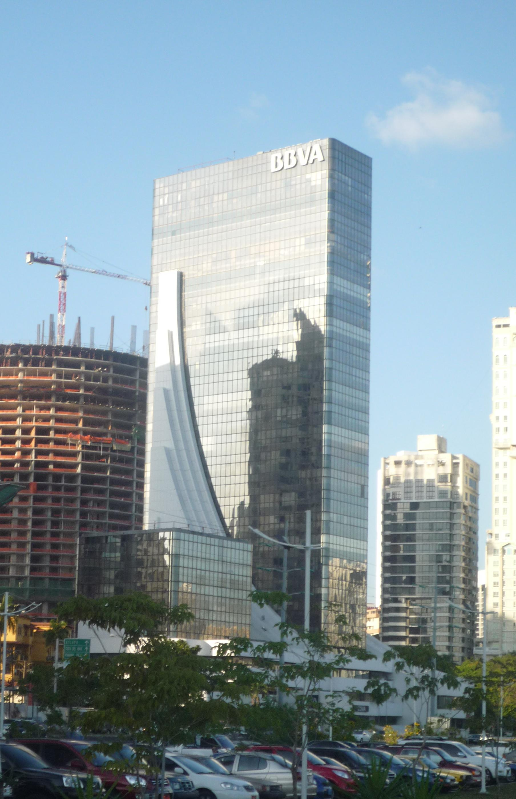 Torre del Banco Exterior (BBVA) Ciudad de Panamá